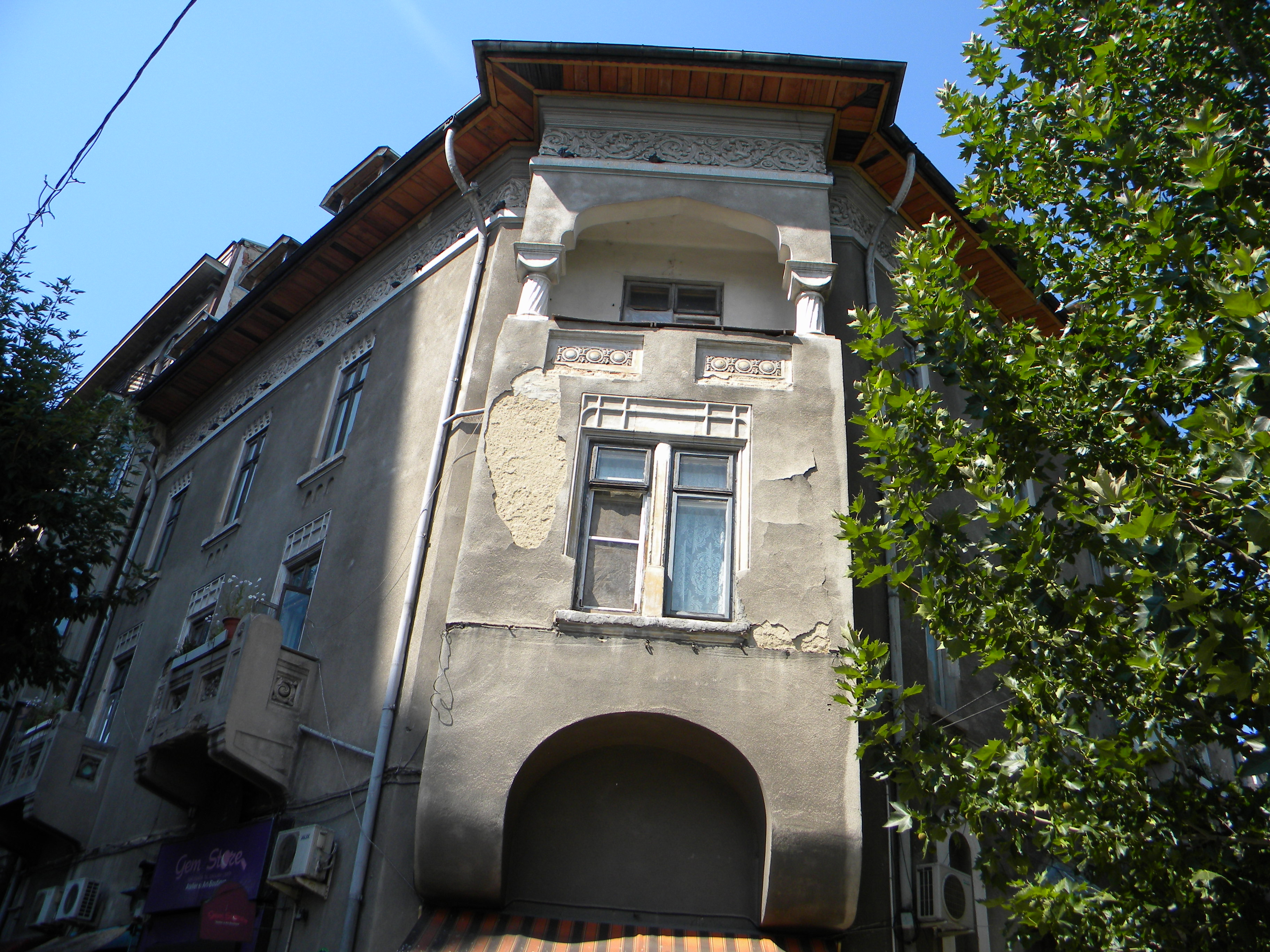 Imobil pe Bd. Carol nr. 39, Bucuresti sect. 2